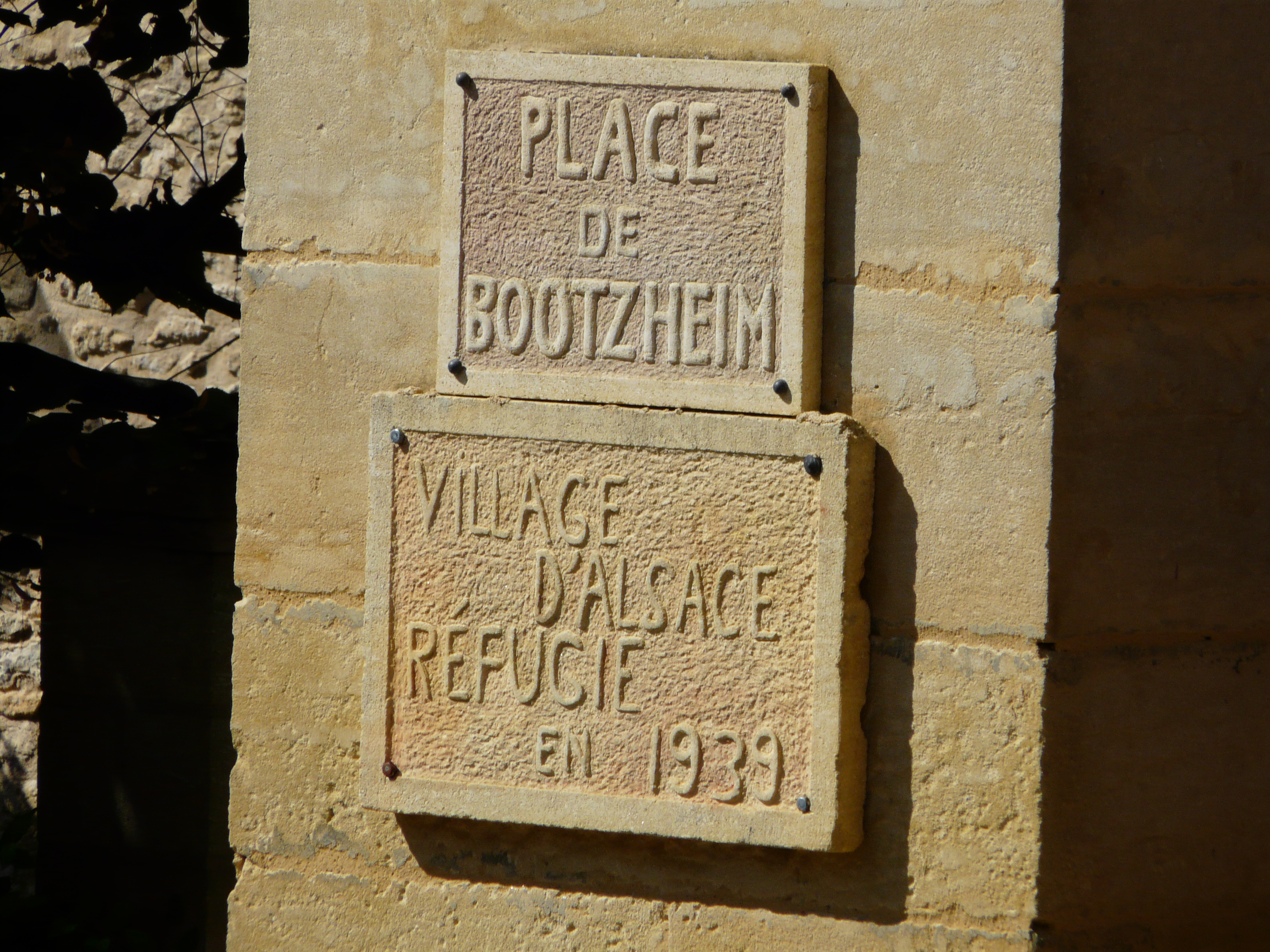 Plaque commémorative du village de Bootzheim, réfugié en 1939 à Plazac, Dordogne, France.